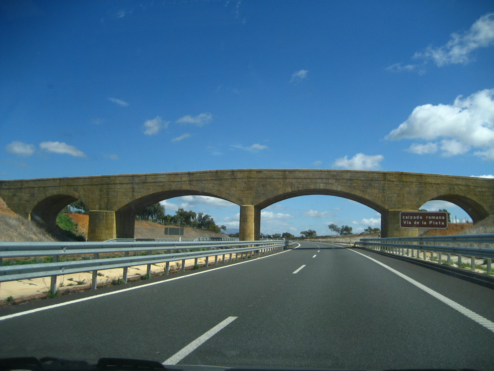 paso de la autovia de la plata por una reproduccion de un puente romano de la via de la plata